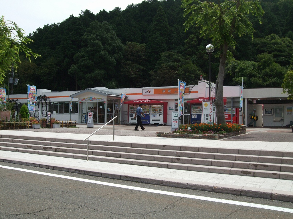 名神高速道路 伊吹パーキングエリア（下り線・京都方面）